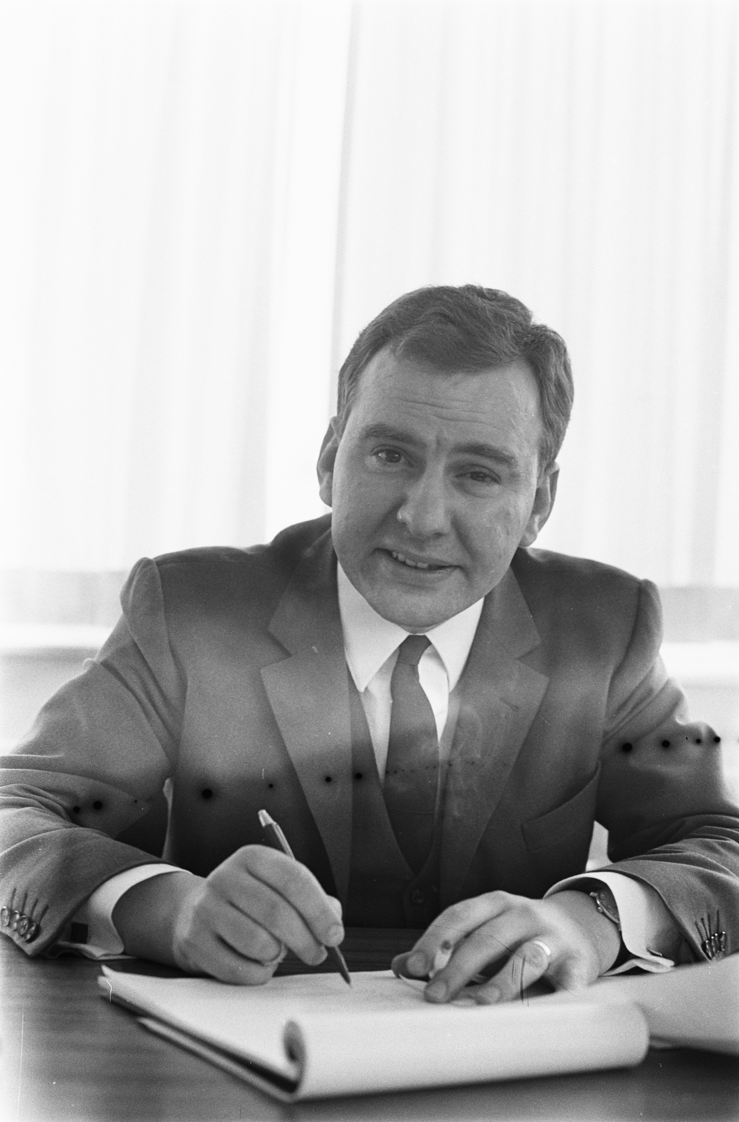 Collectie / Archief : Fotocollectie Anefo Reportage / Serie : [ onbekend ] Beschrijving : Drs. J. Oostenbrink, secretaris van de Raad van het Grootwinkelbedrijf Datum : 5 maart 1969 Trefwoorden : portretten, secretarissen Persoonsnaam : Oostenbrink, J.J.M. Fotograaf : Verhoeff, Bert / Anefo Auteursrechthebbende : Nationaal Archief Materiaalsoort : Negatief (zwart/wit) Nummer archiefinventaris : bekijk toegang 2.24.01.05 Bestanddeelnummer : 922-1676